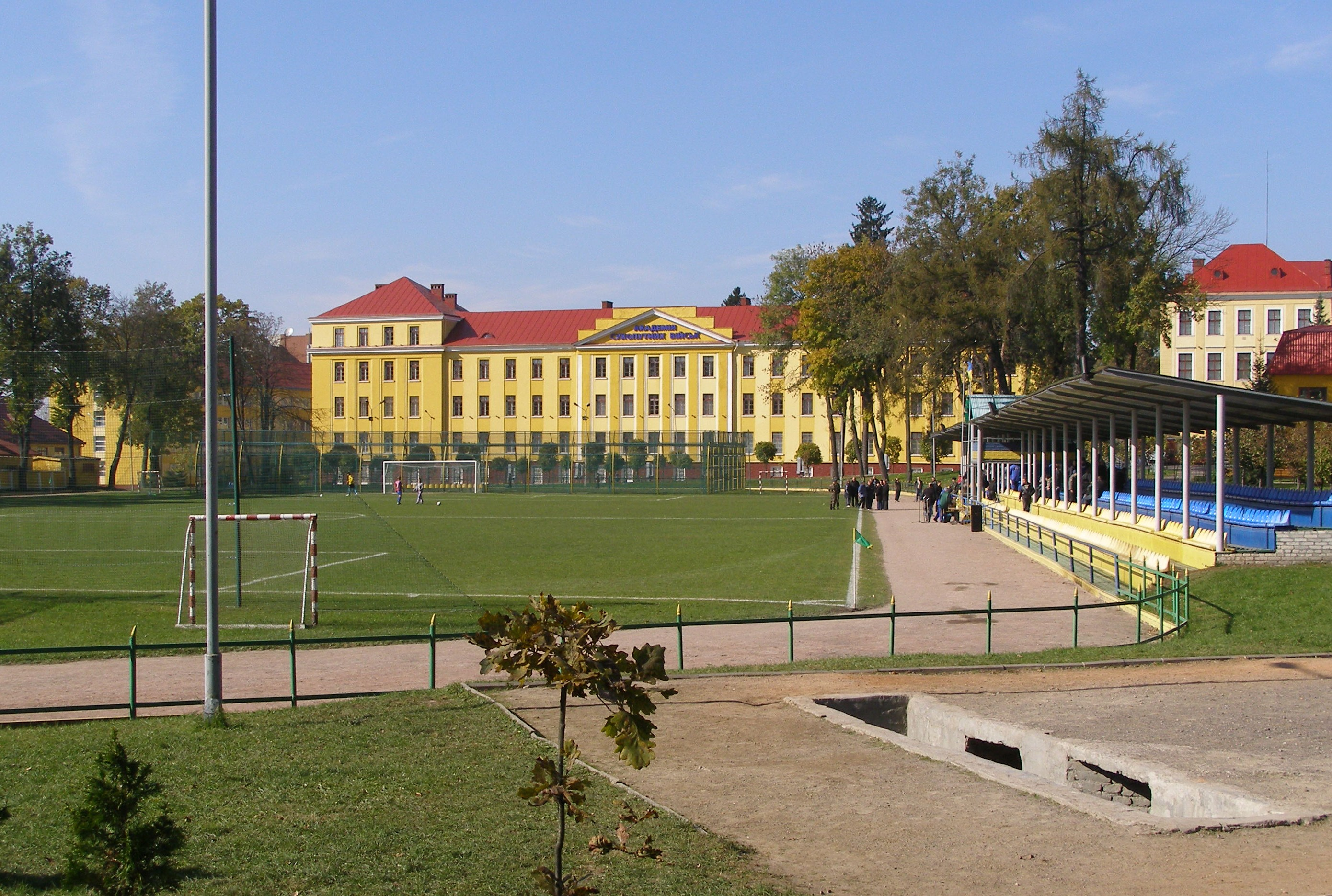 Stadion Legion-Arena neben der Akademie der Landstreitkräfte in Lwiw